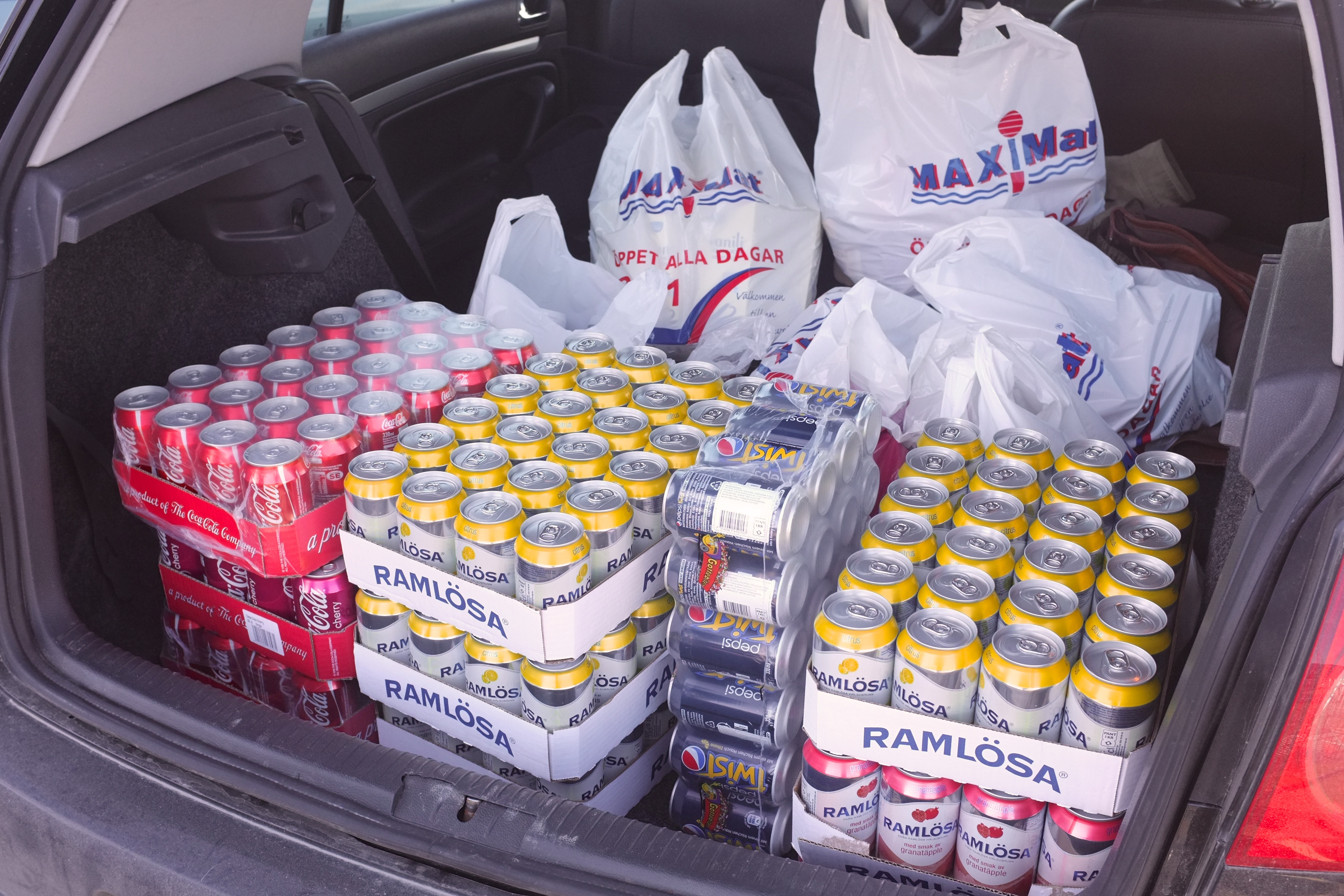 Brus, Ramlösa og mat. Nordby Shoppingcenter i Sverige.